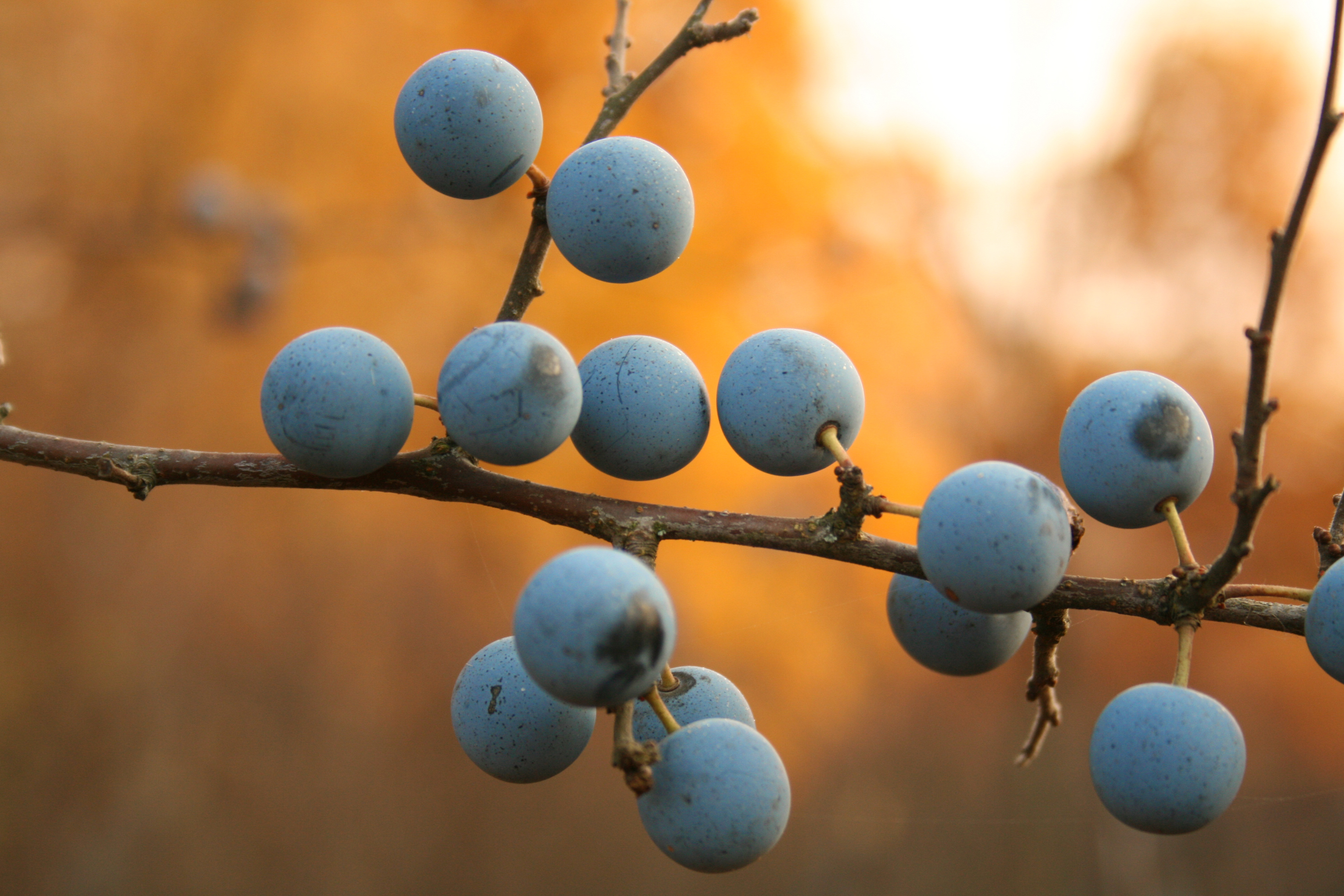 Терн в родовом экопоселении «Кореньские родники». Белгородская область.